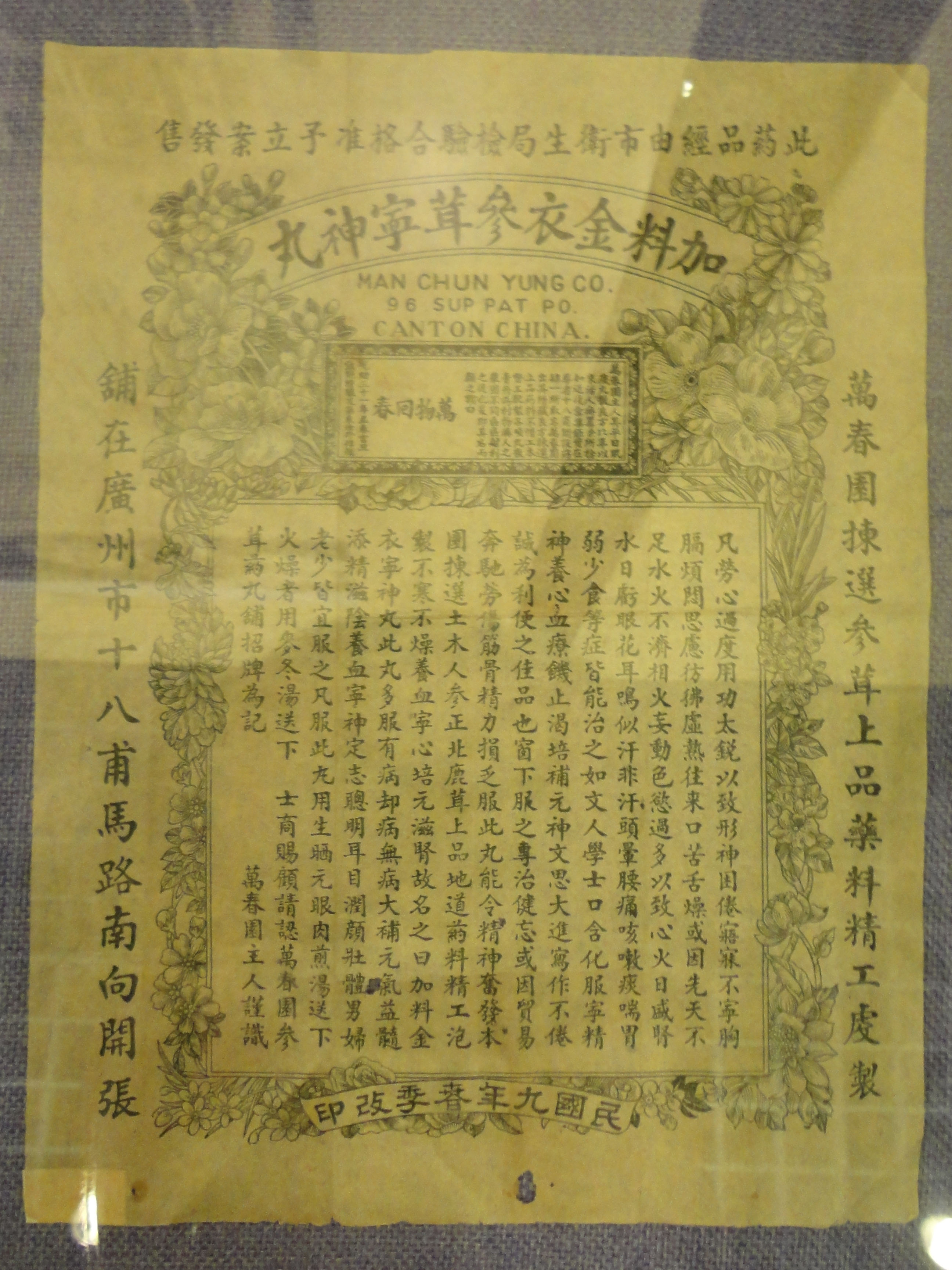 中華民國九年，廣州藥行萬春園的海報，英文以粵音拼寫「Man Chun Yung」，地址十八甫「Sup Pat Po」。